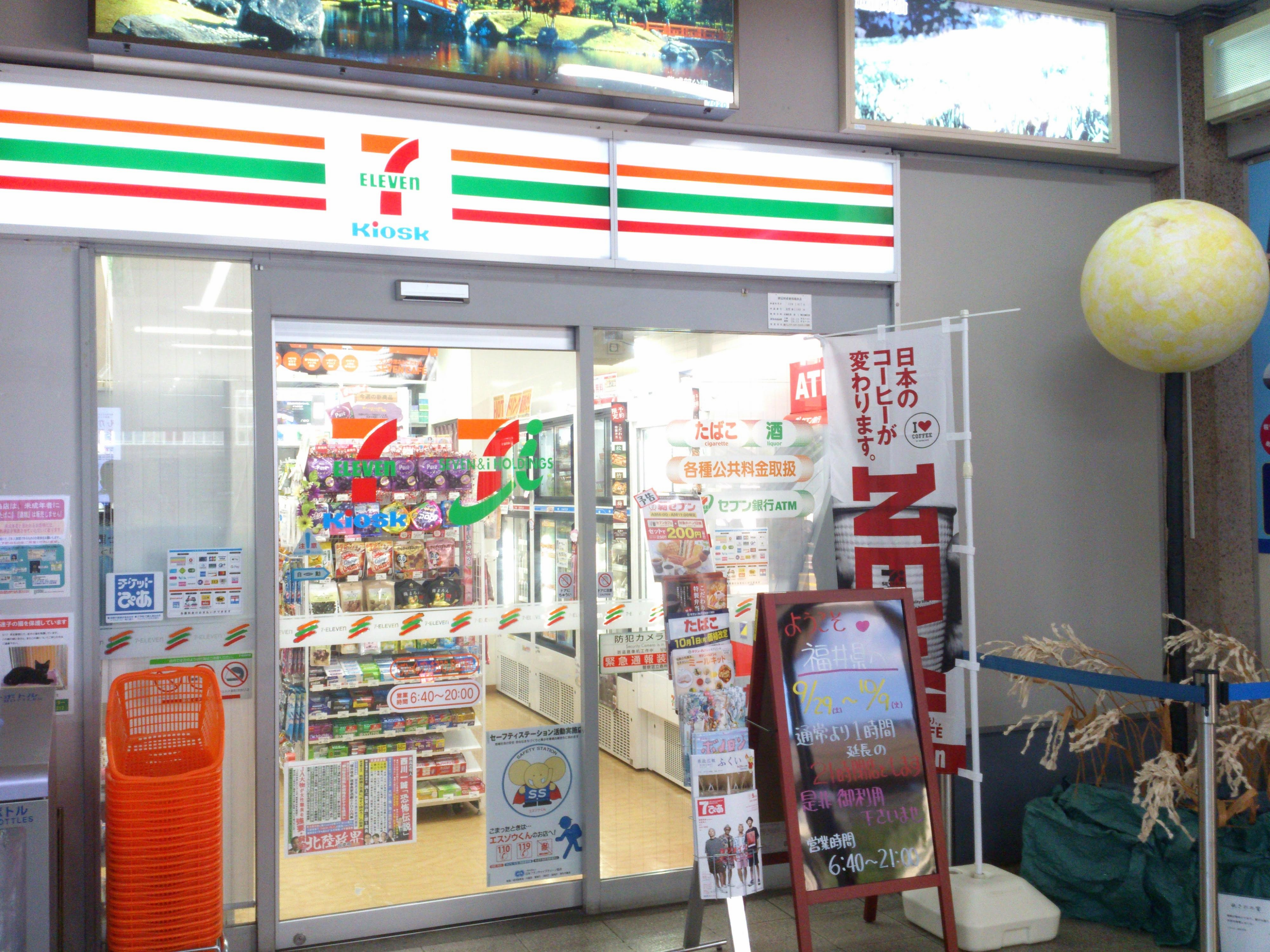 武生駅のセブンイレブン